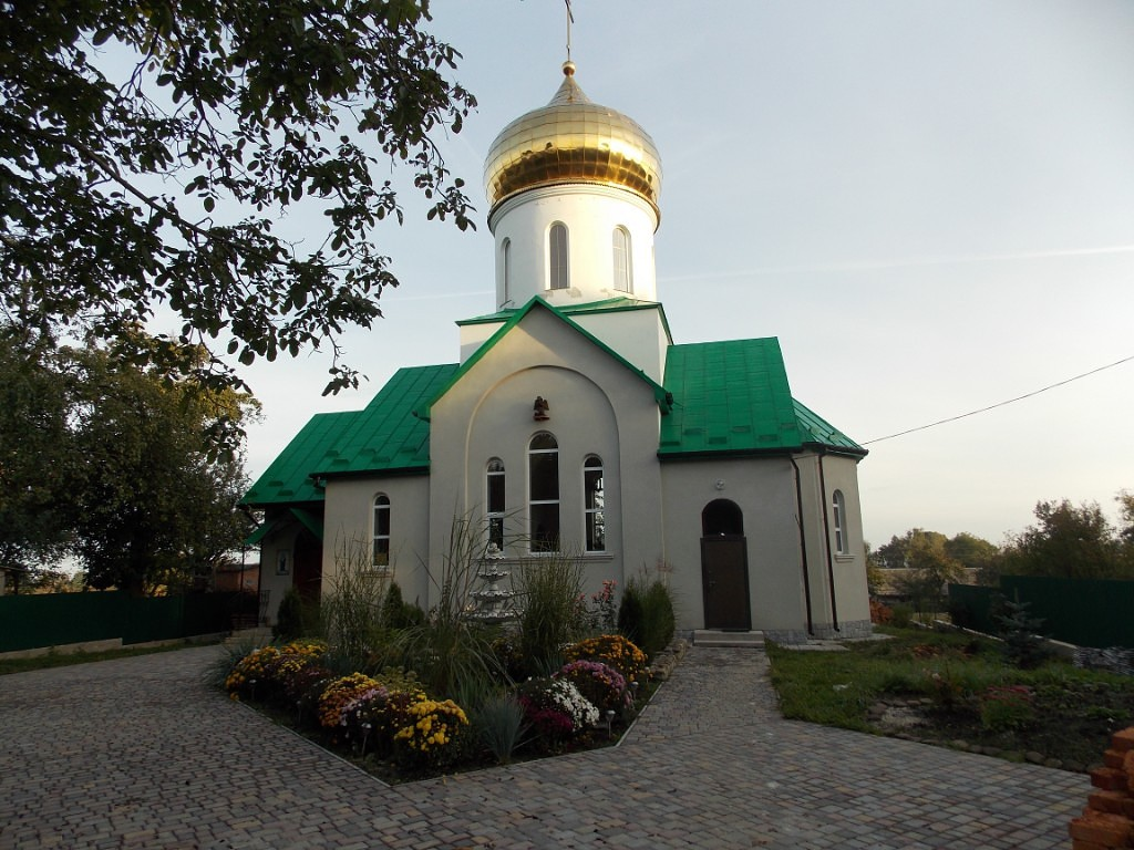 Фото зроблене з нагоди свята.